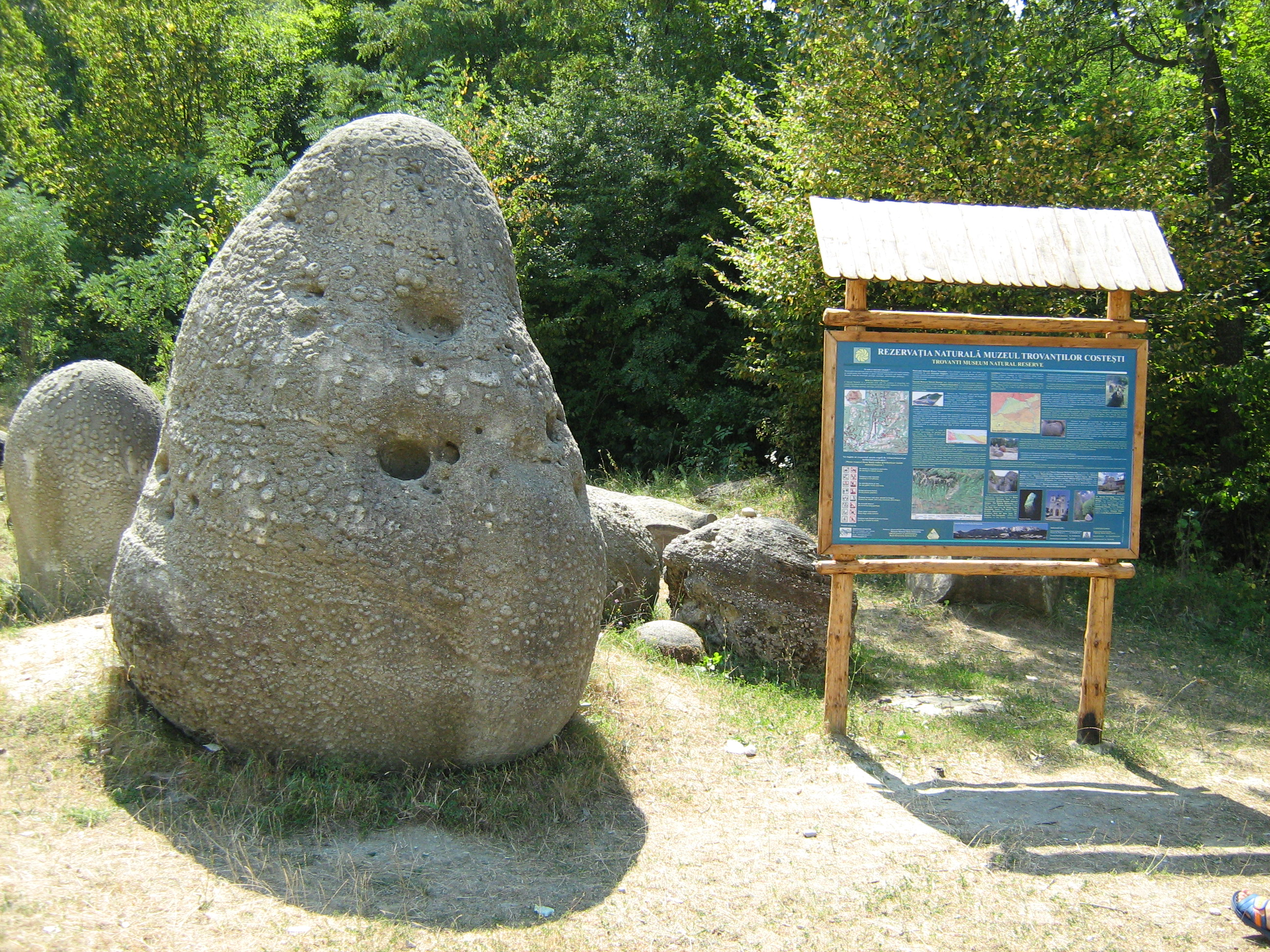 A trovant at Costesti, Romania